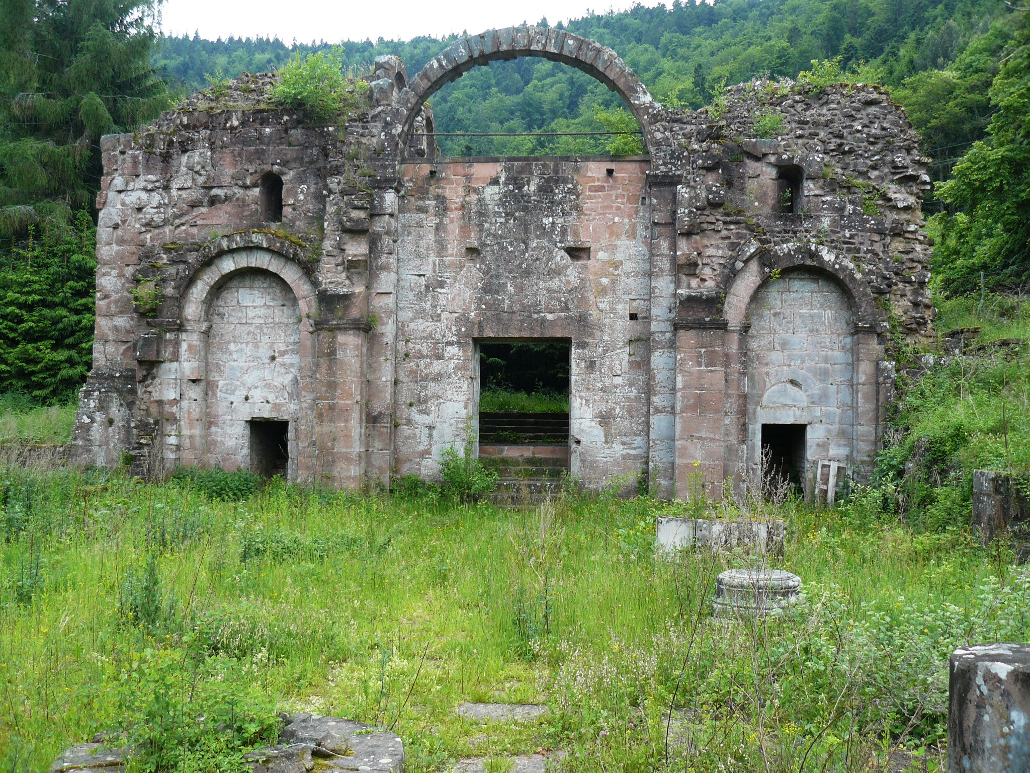 Vestiges de l'église abbatiale de Niedermunster : on distingue les deux tours latérales contenant les escaliers, bordant le porche.